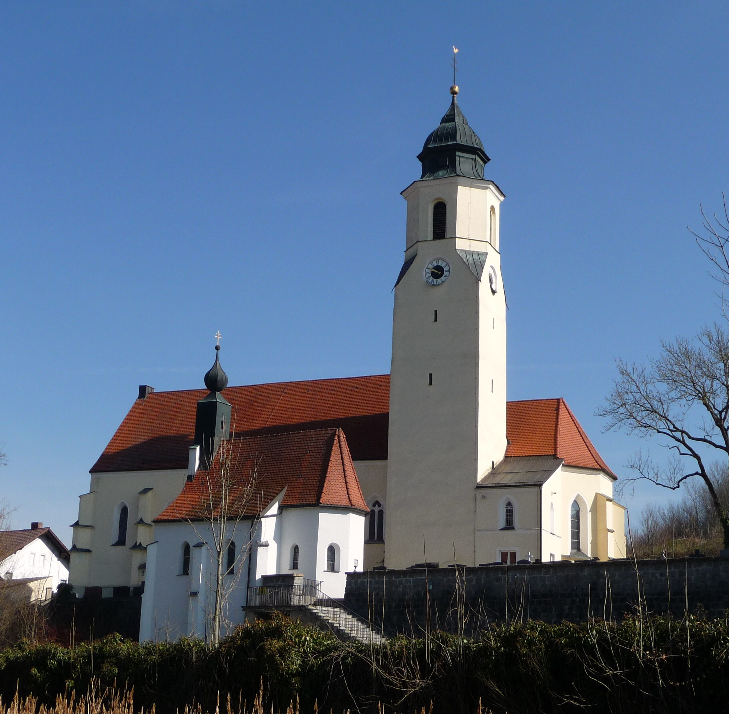 Die Pfarrkirche St. Michael und die Kapelle St. Maria (im Vordergrund) in Engertsham